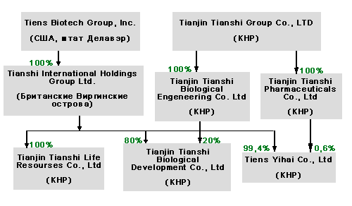 Схема распределения долей владения в основных компаниях группы Tiens Group.